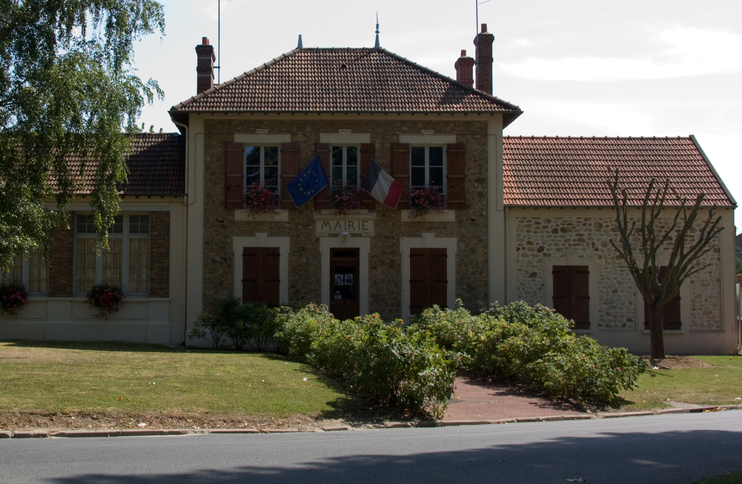 Mairie de Nainville-les-Roches. Nainville-les-Roches, Essonne. France.